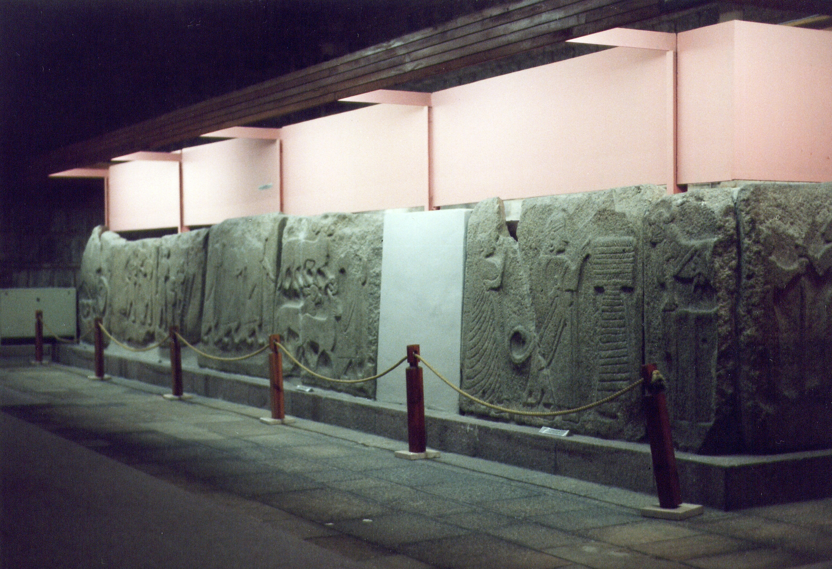 Museum für anatolische Zivilisationen, Ankara, Türkei Reliefs aus Alacahöyük